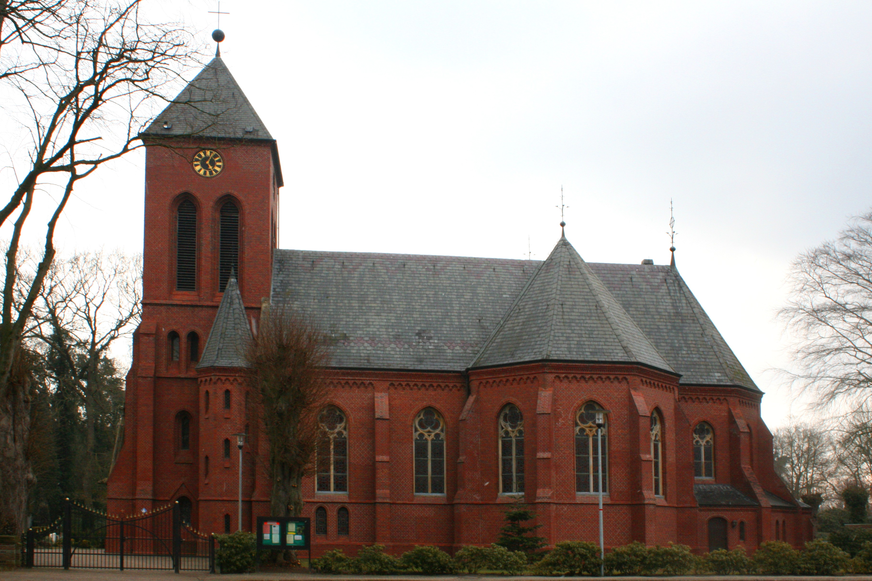 Ofener Kirche